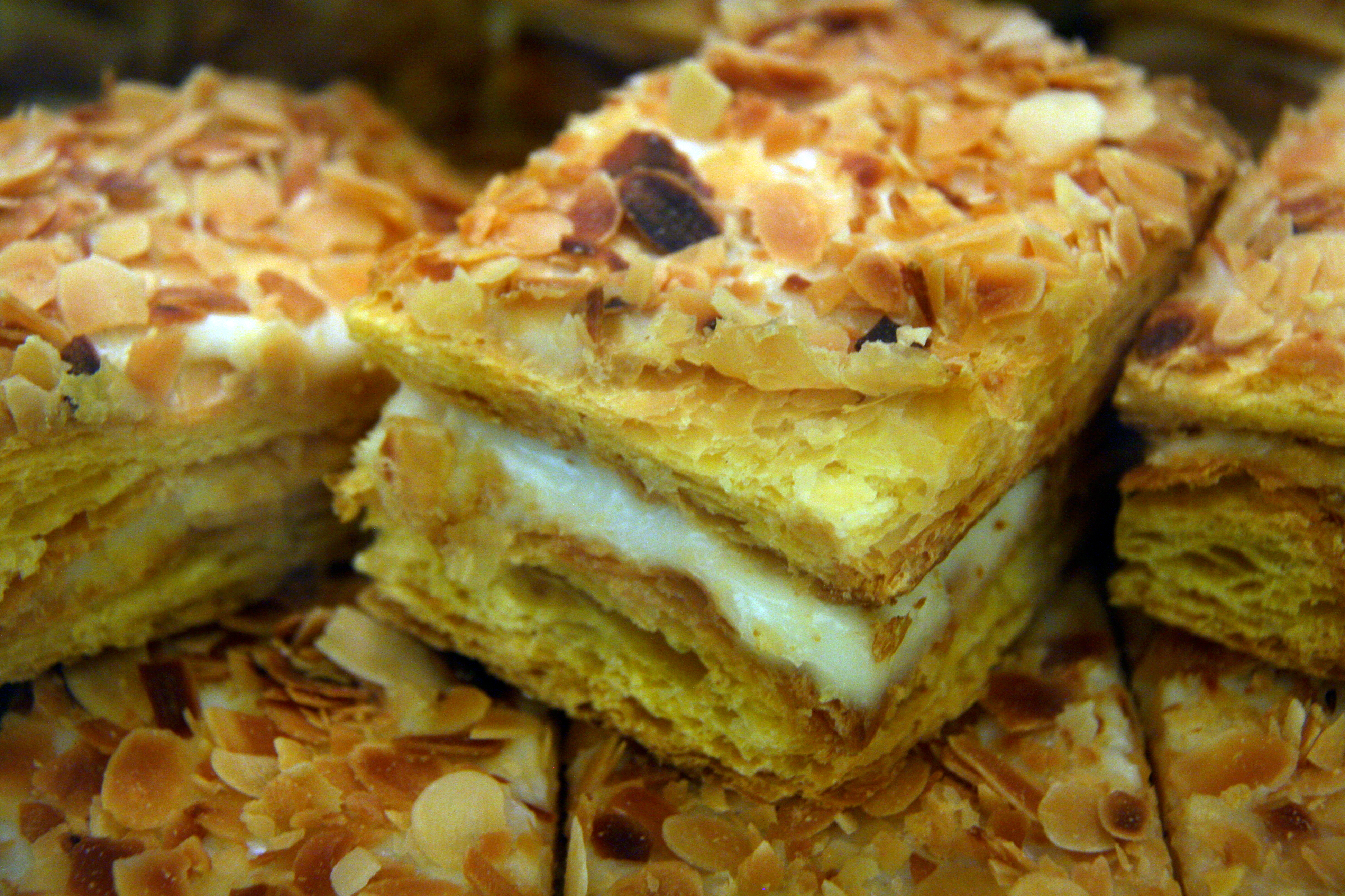 Pasteles de crema recubiertos de almendra